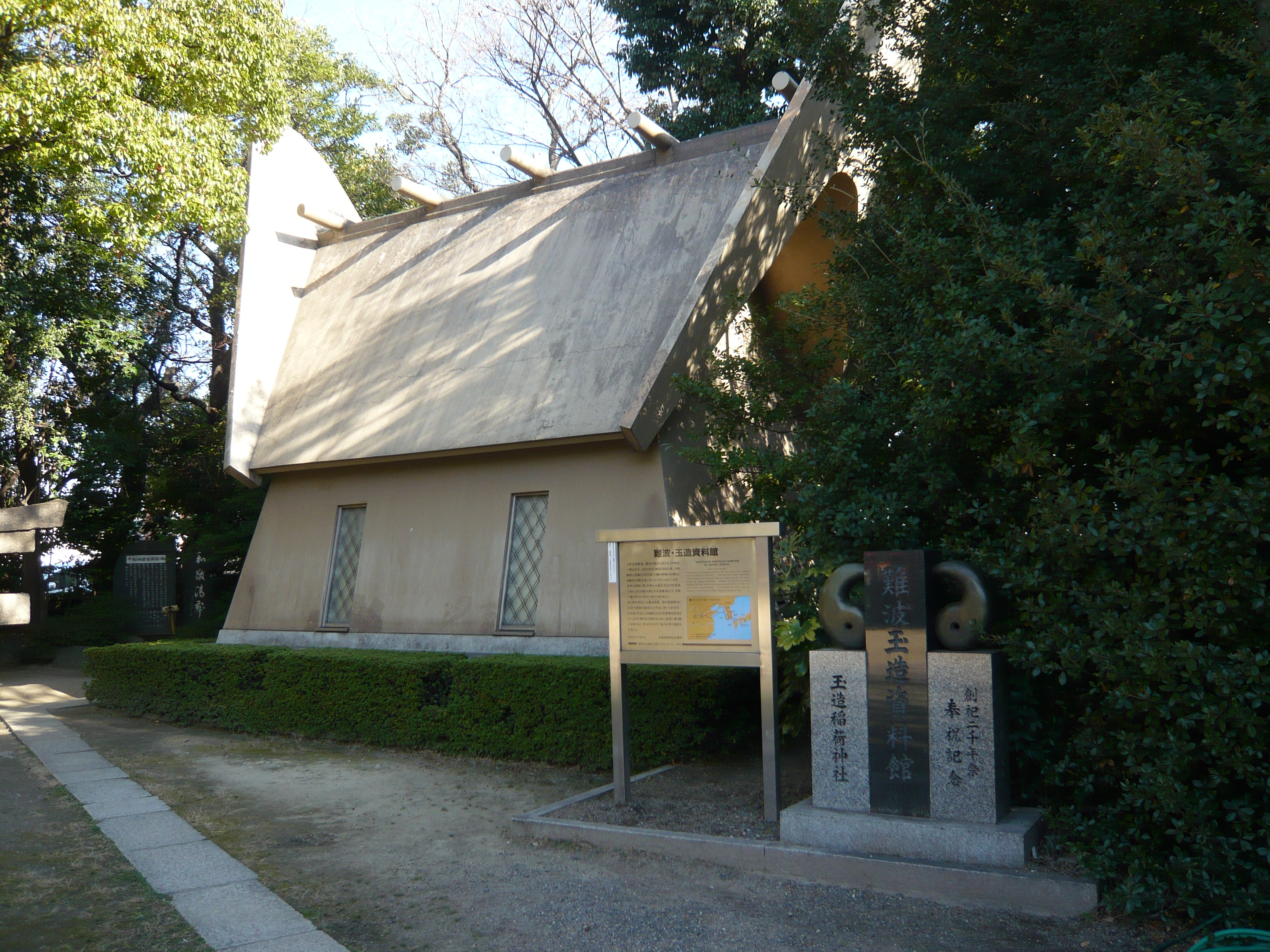 Tamatsukuri-inari-jinja, Chūō, Ōsaka, Ōsaka, Japan 玉造稲荷神社（大阪市中央区）内 難波・玉造資料館